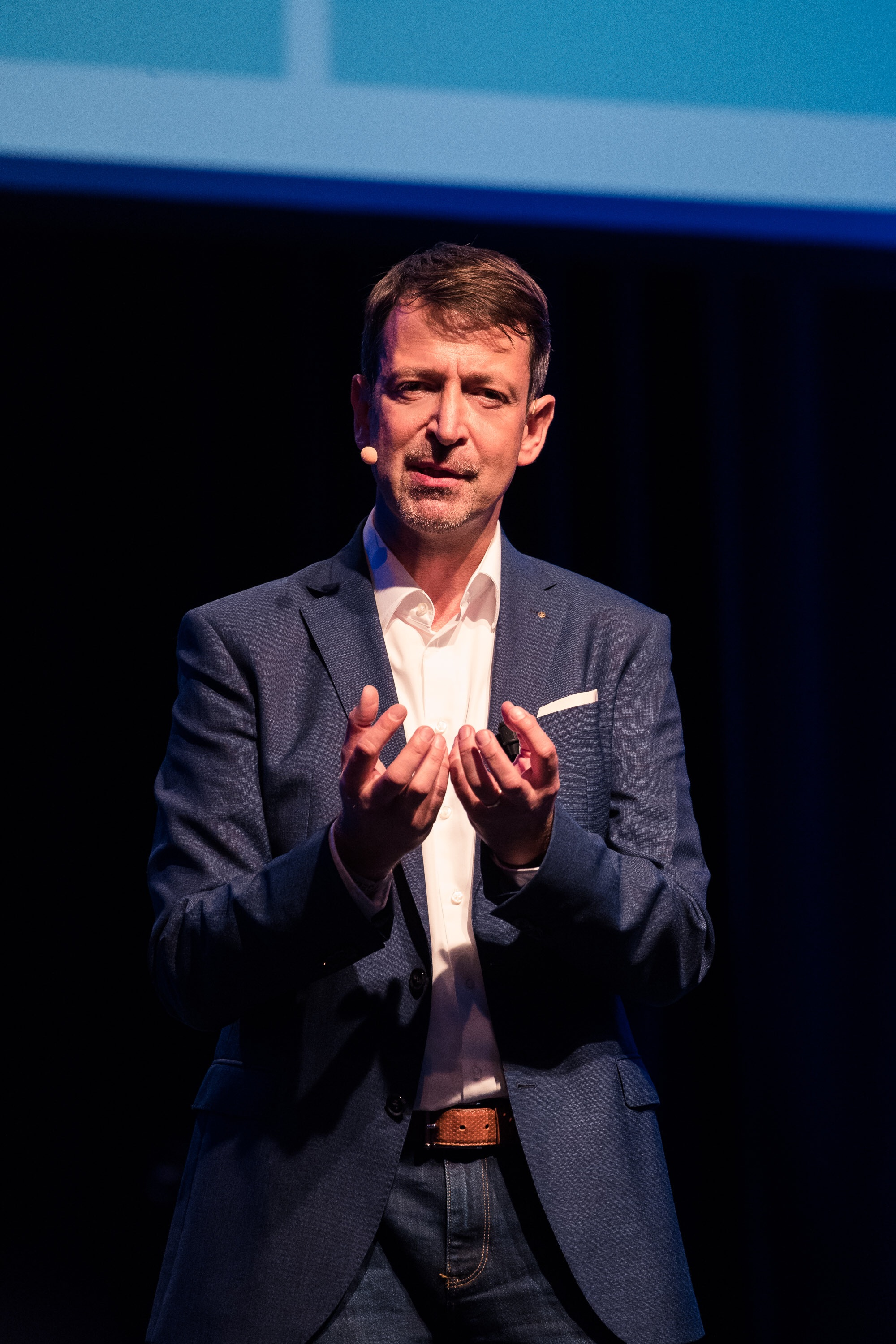 Steffen Ritter 2017 in Köln